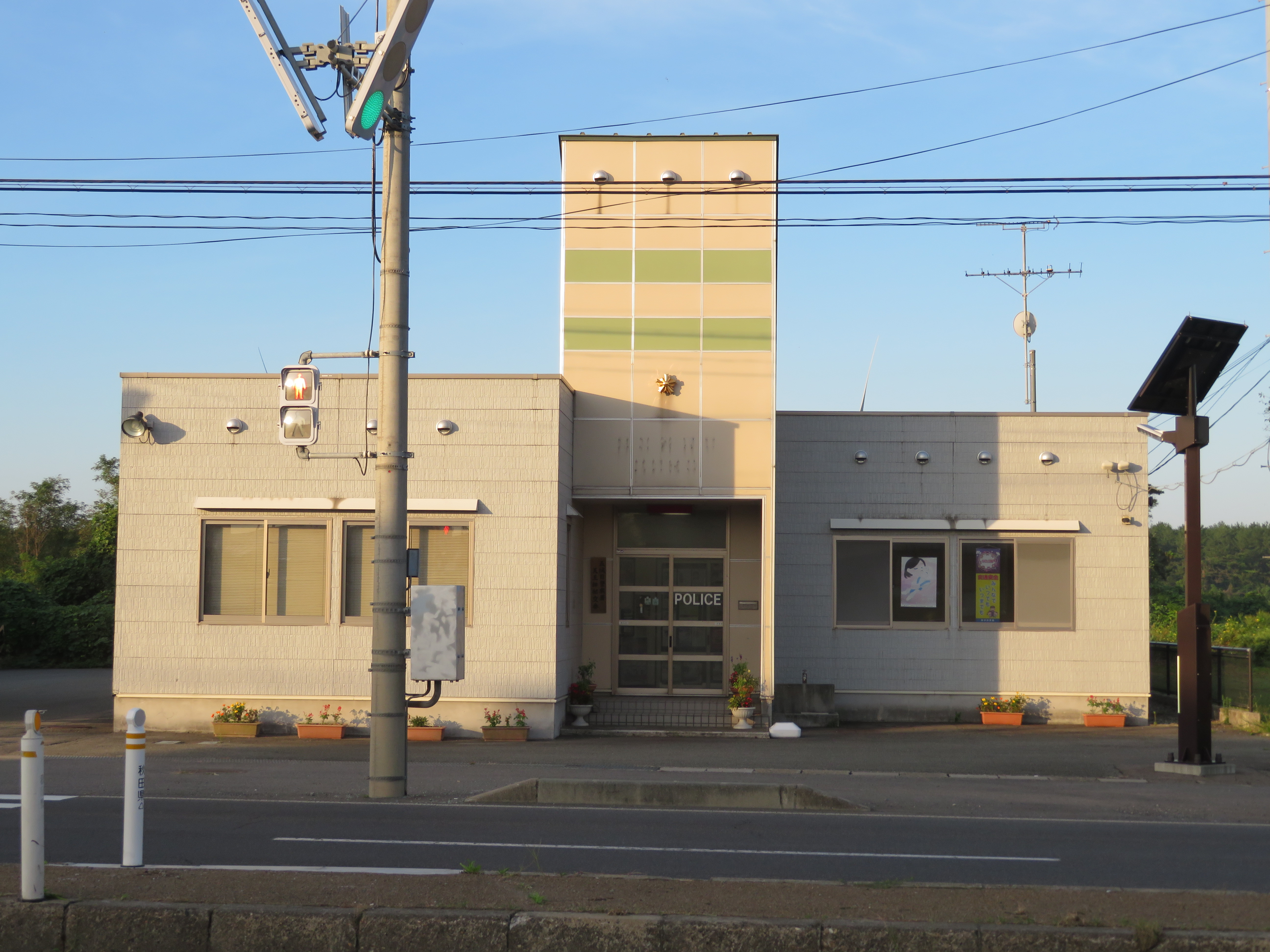 秋田県潟上市に所在する五城目警察署天王幹部交番 Canon PowerShot SX720 HS